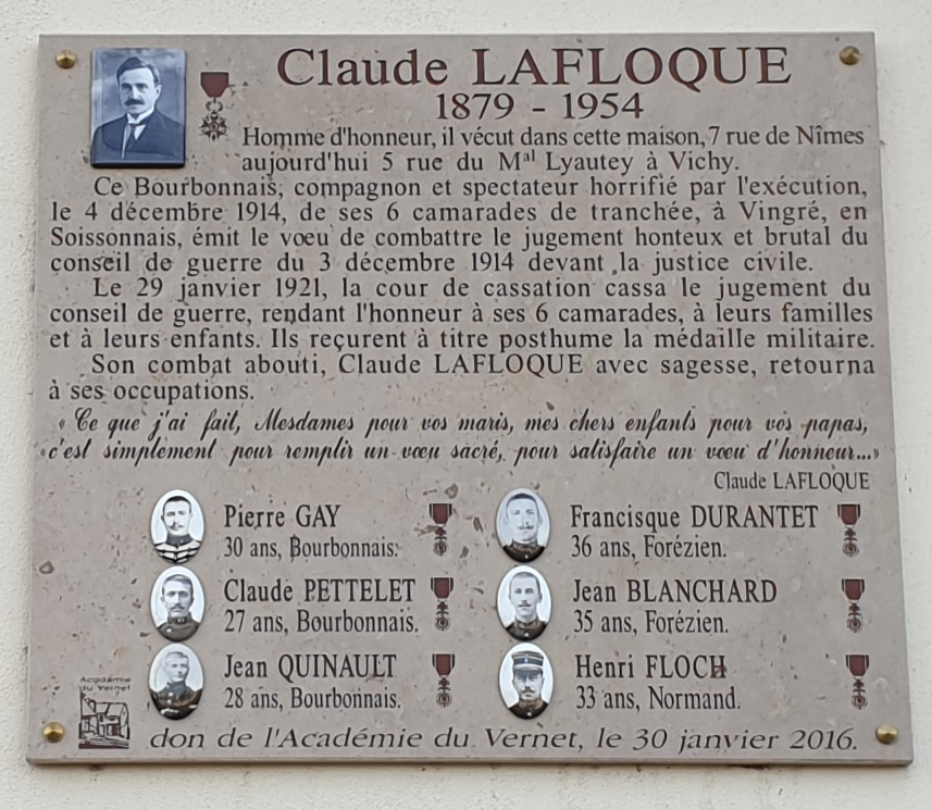 Plaque commémorative de Claude Lafloque sur son ancienne maison au 5 rue Maréchal-Lyautey.